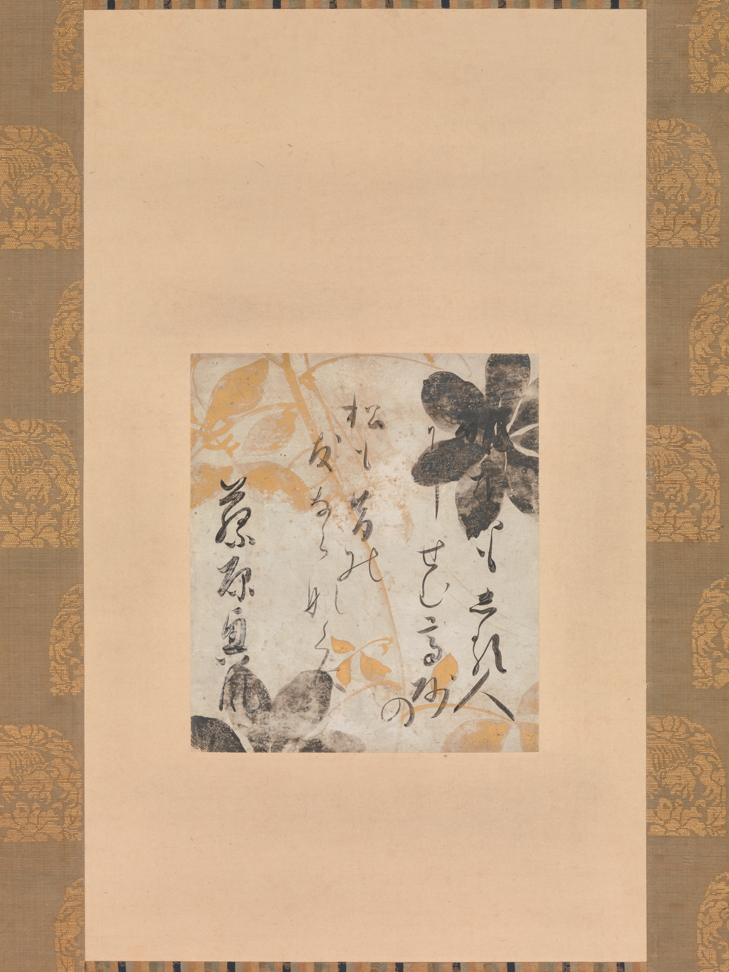 Japan; Hanging scroll; Paintings